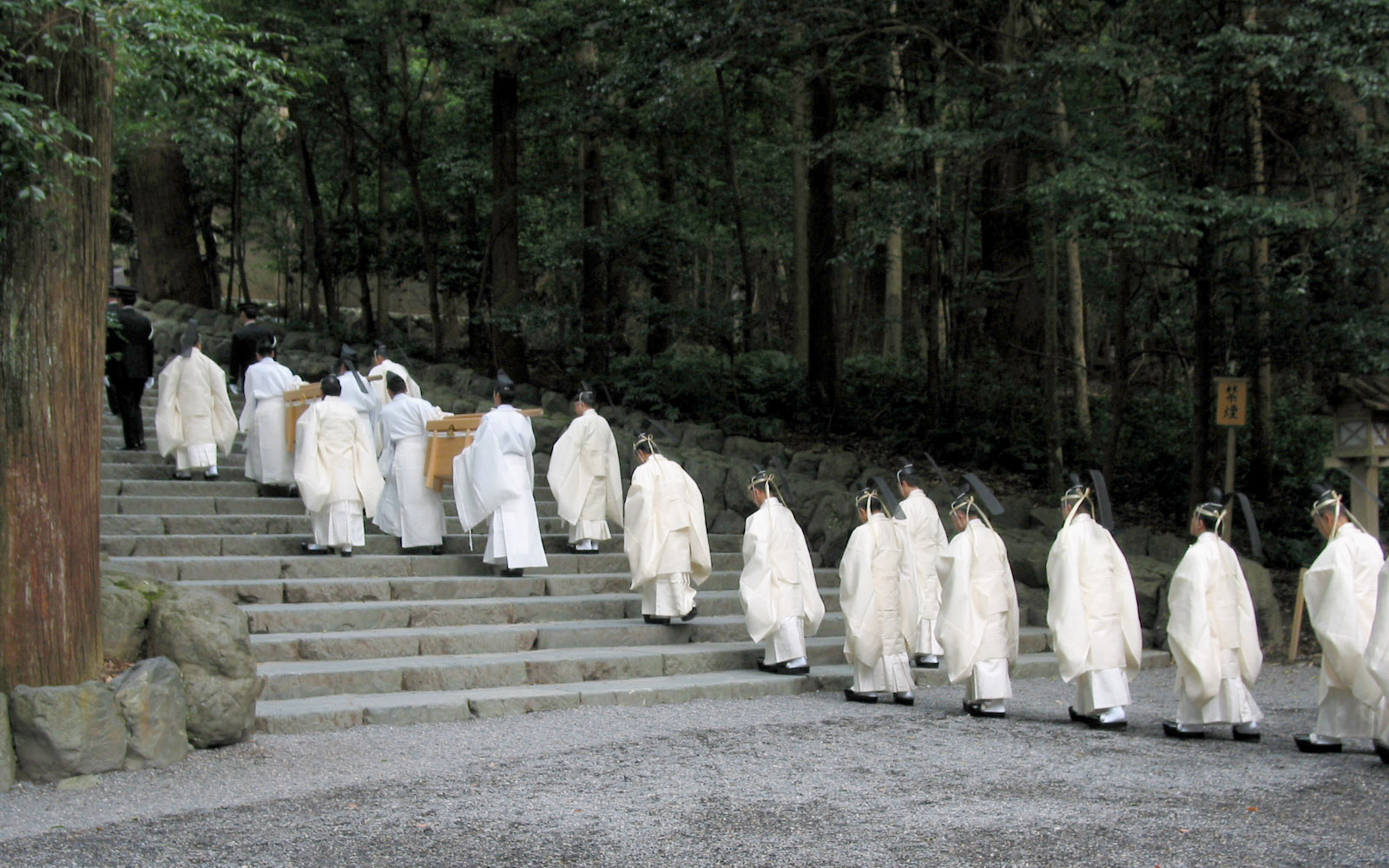 Kanmiso-sai (Naiku) 神御衣祭・参進（皇大神宮・正宮）